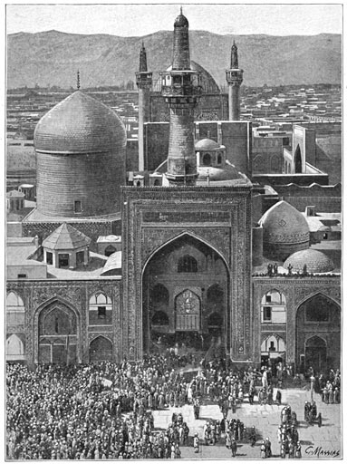 "Moskee te Mesjed"